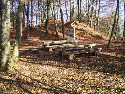 Donjon der Benzenburg